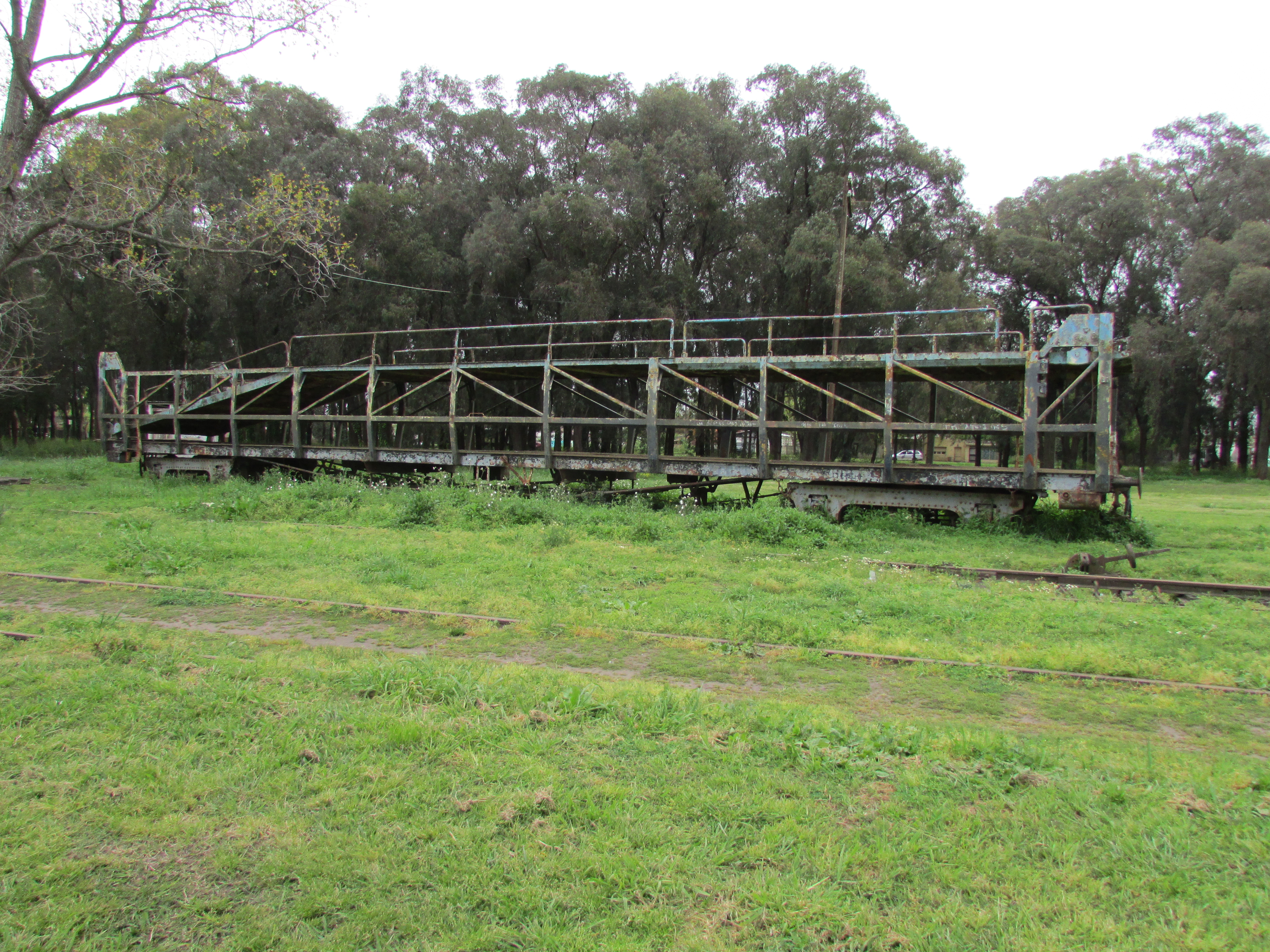 Bandeja automovilera en la estación General Madariaga del Ferrocarril General Roca, en la ciudad del mismo nombre, provincia de Buenos Aires, Argentina.